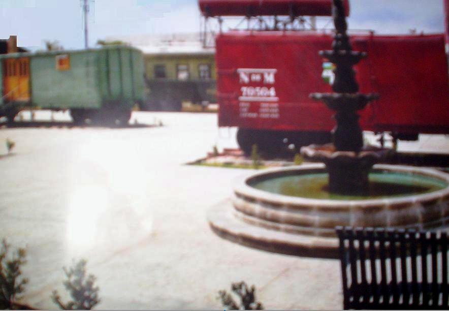 Antigua estación de Ferrocarriles de la ciudad de Cuautla, Morelos.